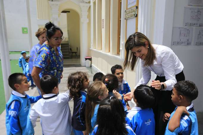 María Fernanda Pacheco saluda a los niños del Guagua Centro ‘El Arbolito’.